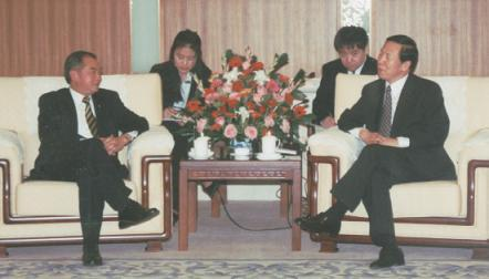 戴相龙和蘇震西